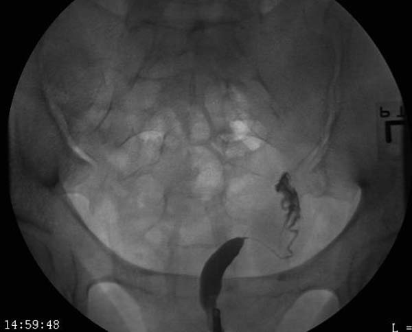 Unicornuate uterus